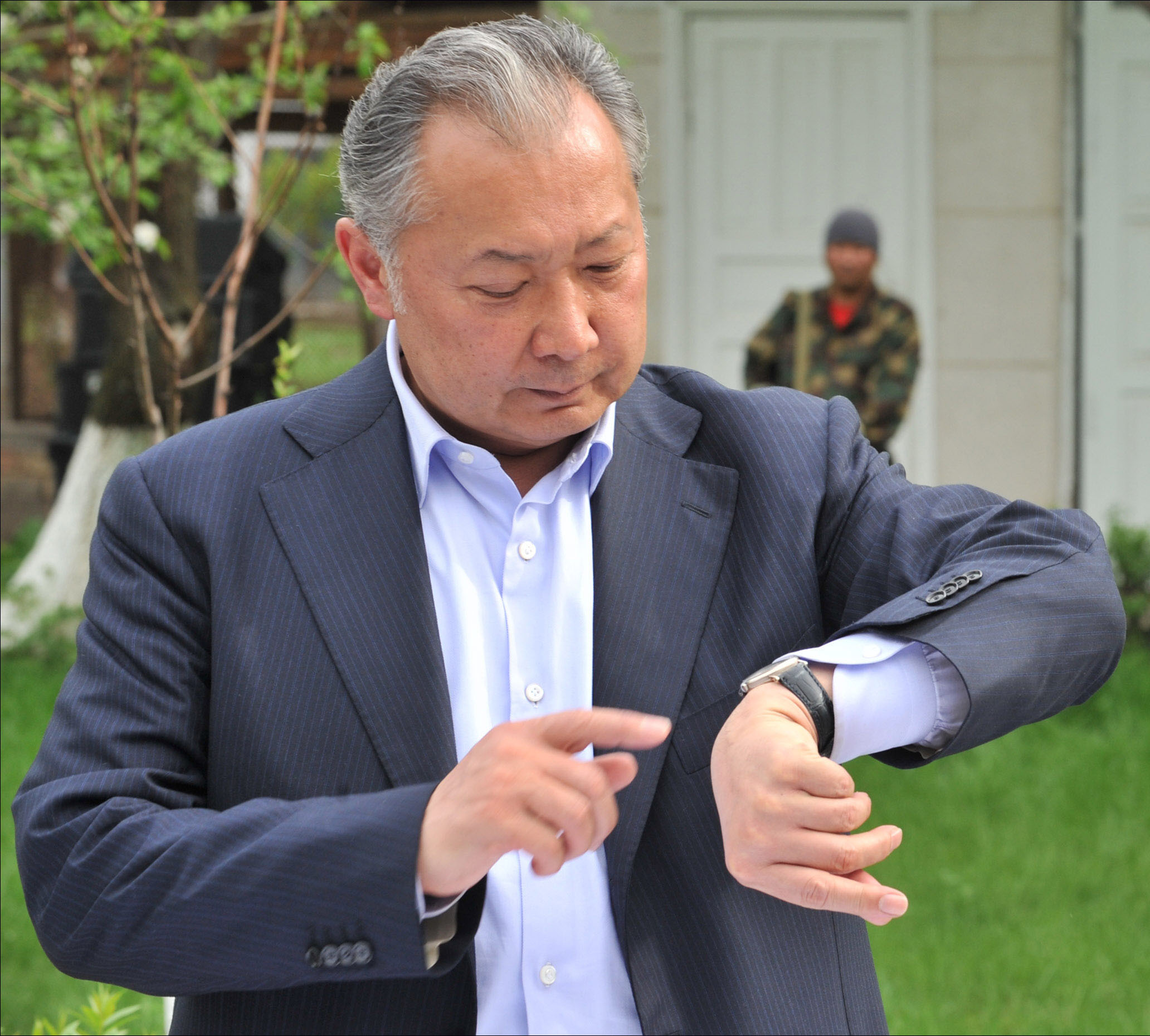 Oʻzbekcha/ўзбекча: Mirzoulug'bek